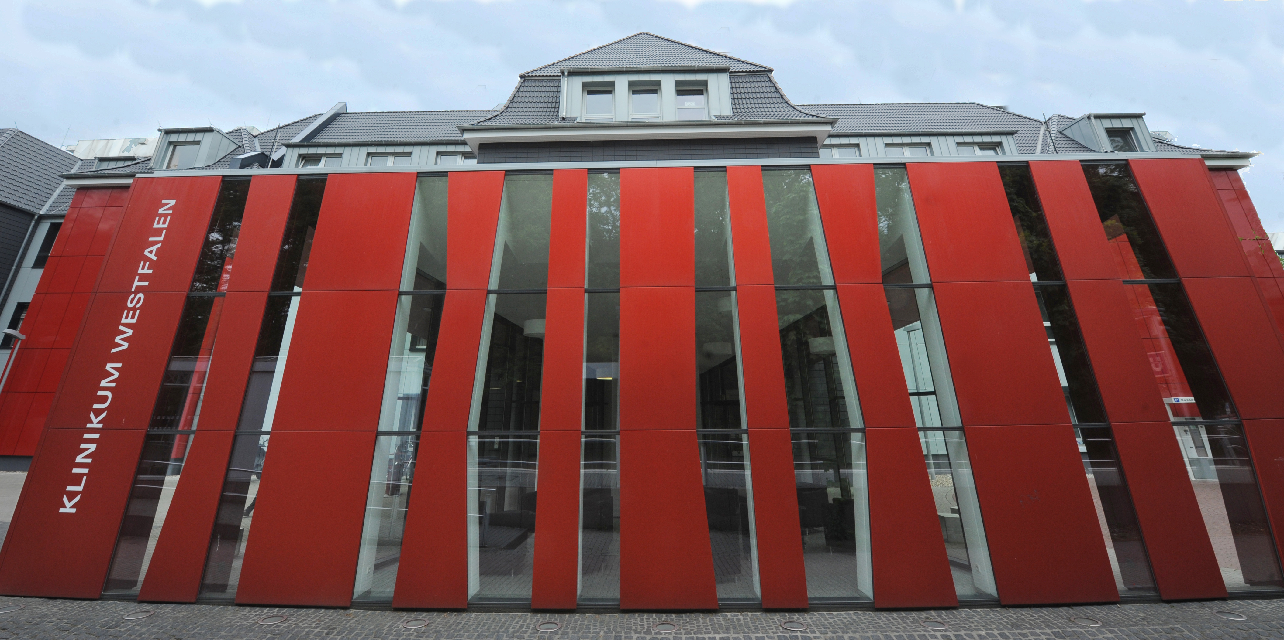 Die Straßenansicht der Klinik am Park Lünen